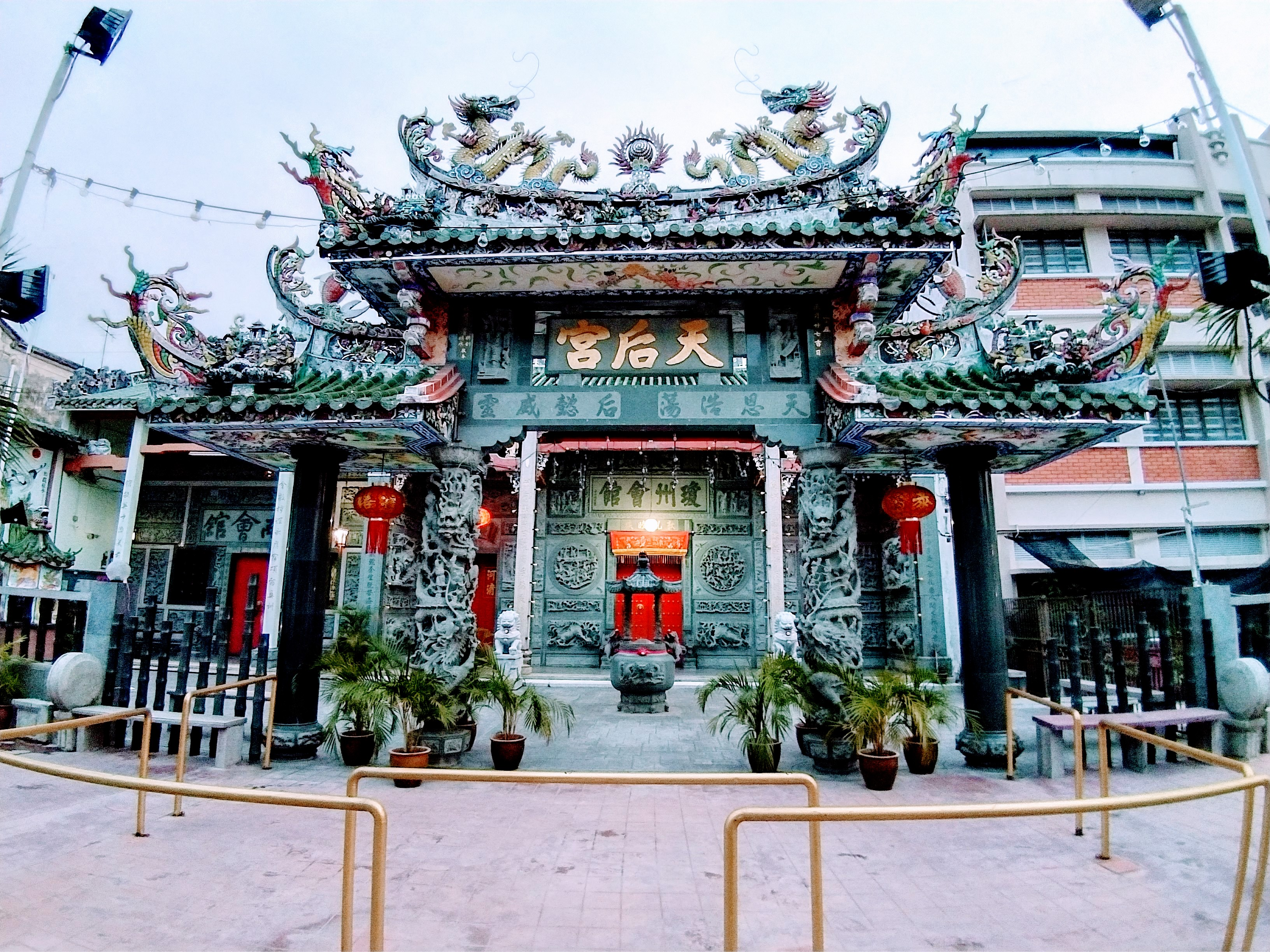 馬來西亞檳城(喬治市)天后宮